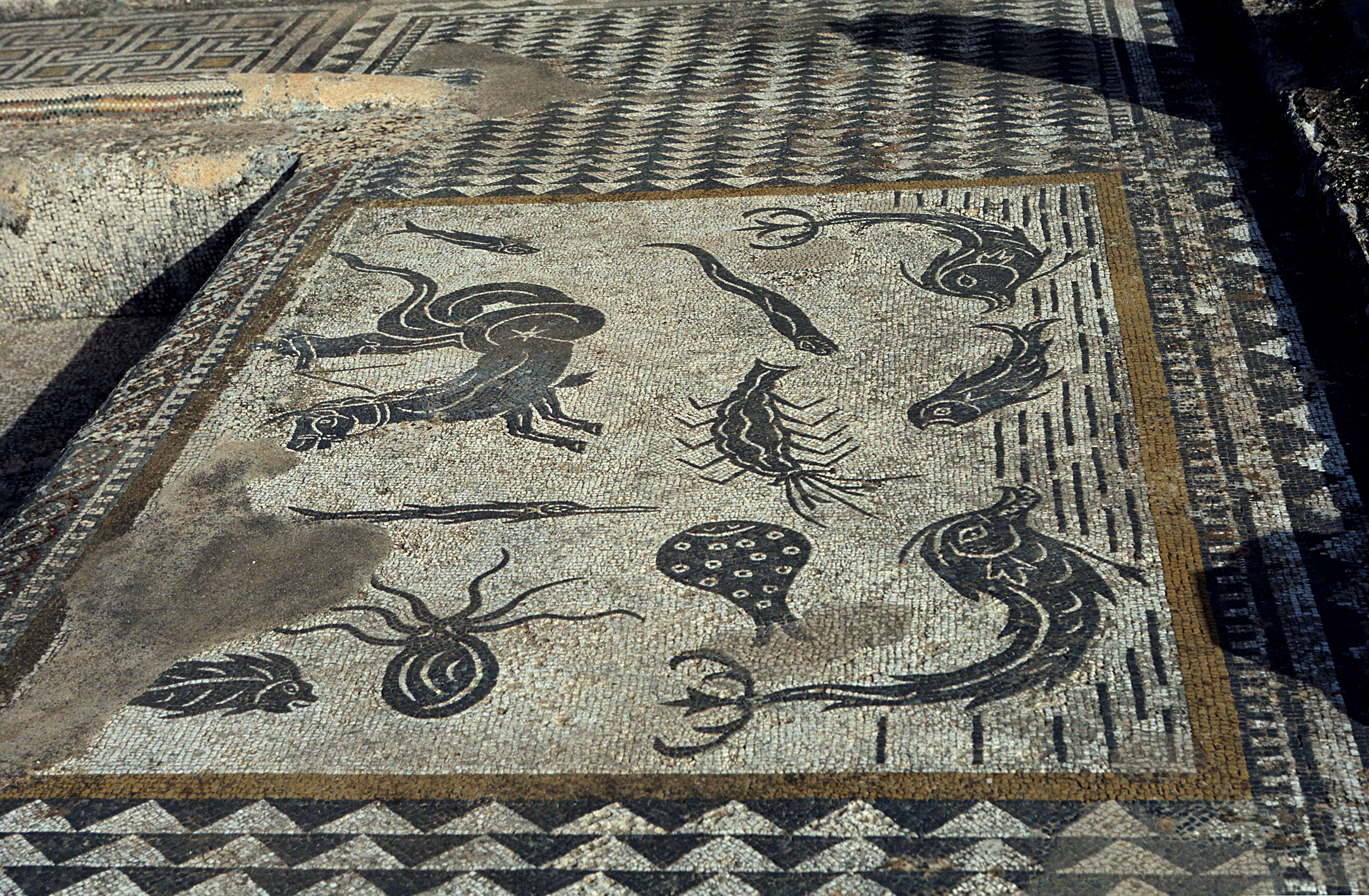 Volubilis, Morocco